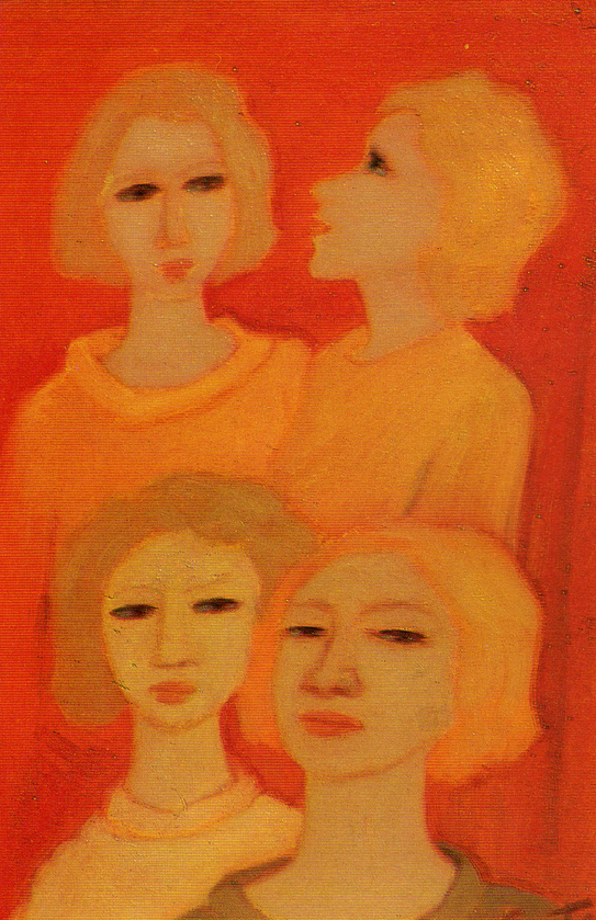 foto opera pubblicata sul Catalogo "L'élite" - selezione arte italiana di Varese, 1985, p. 56; opera donata alla Fondazione "Lercaro" di Bologna.